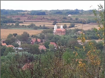 Krežbinac